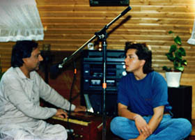 Nasrat Parsa & Ustad.